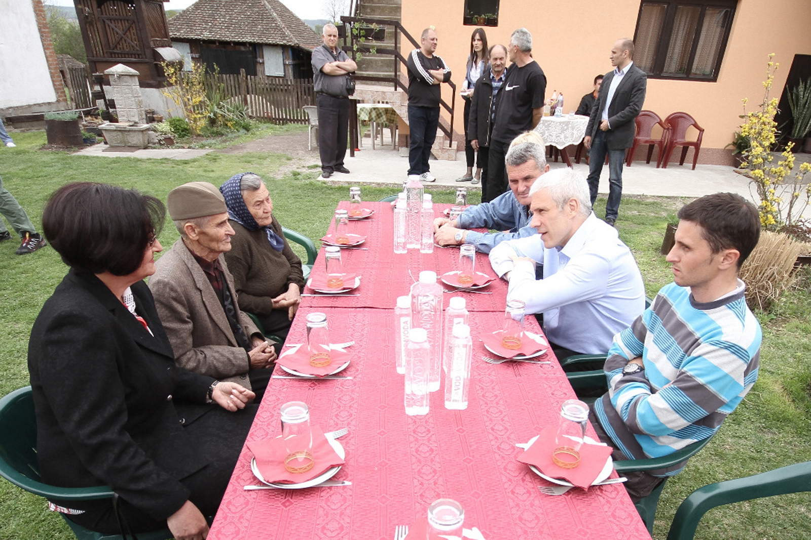 Kandidat za predsednika Srbije i predsednik Demokratske stranke Boris Tadić u u poseti domaćinstvu porodice Grčić, gde je prisustvovao tradicionalnom običaju farbanja jaja za Uskrs (13. april 2012); Foto servis DS